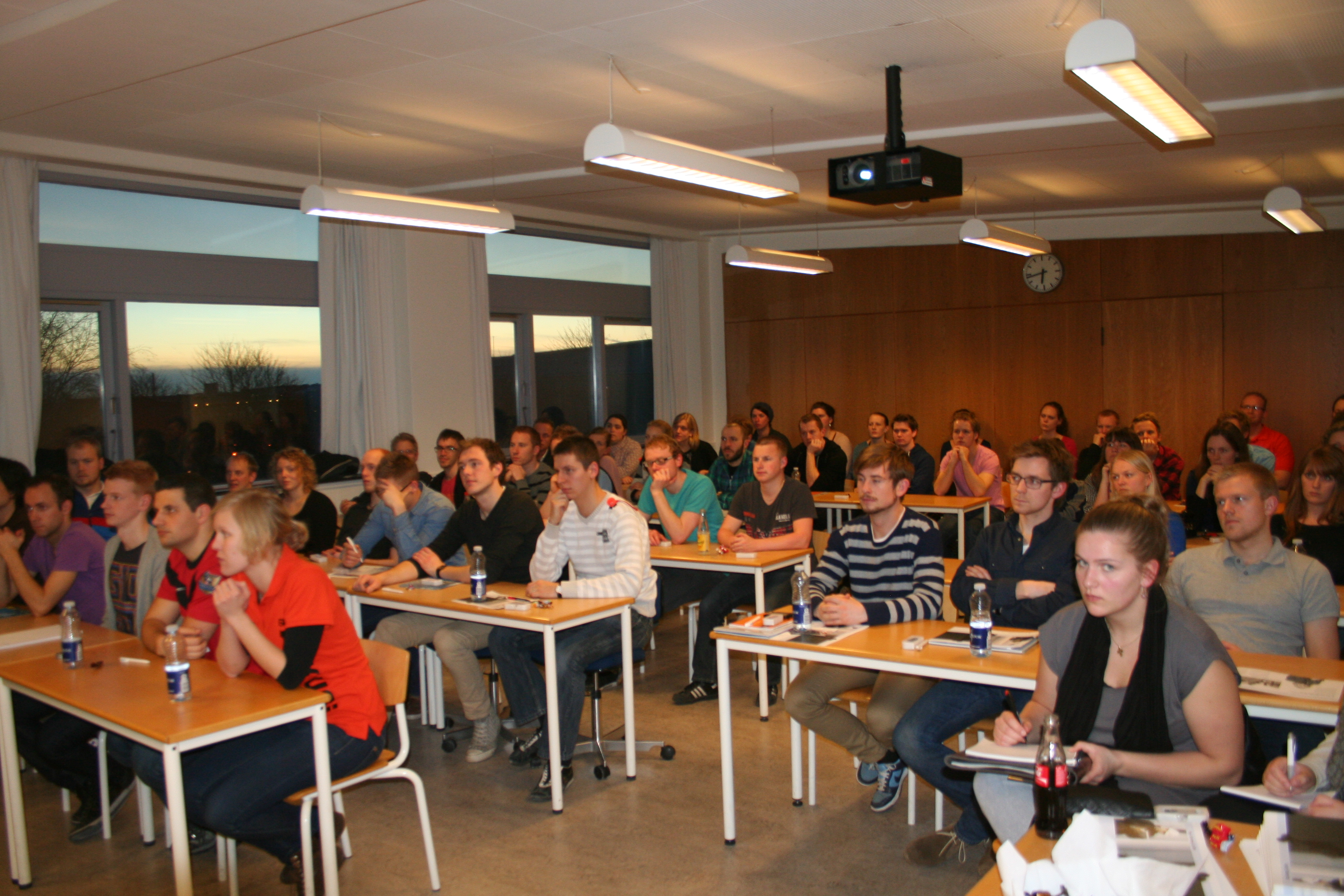 Fokusaften Aalborg